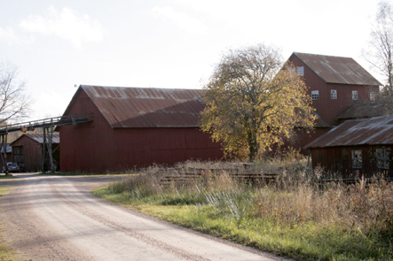 Trovströfabriken från norr